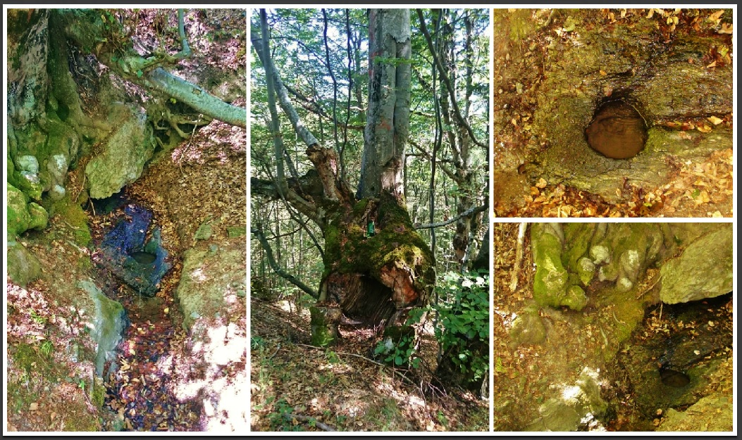 Праисторическо култово съоръжение и свещенизвор в местността Паниче край махала Шипковци при село Долна Мелна, Община Трън, Област Перник